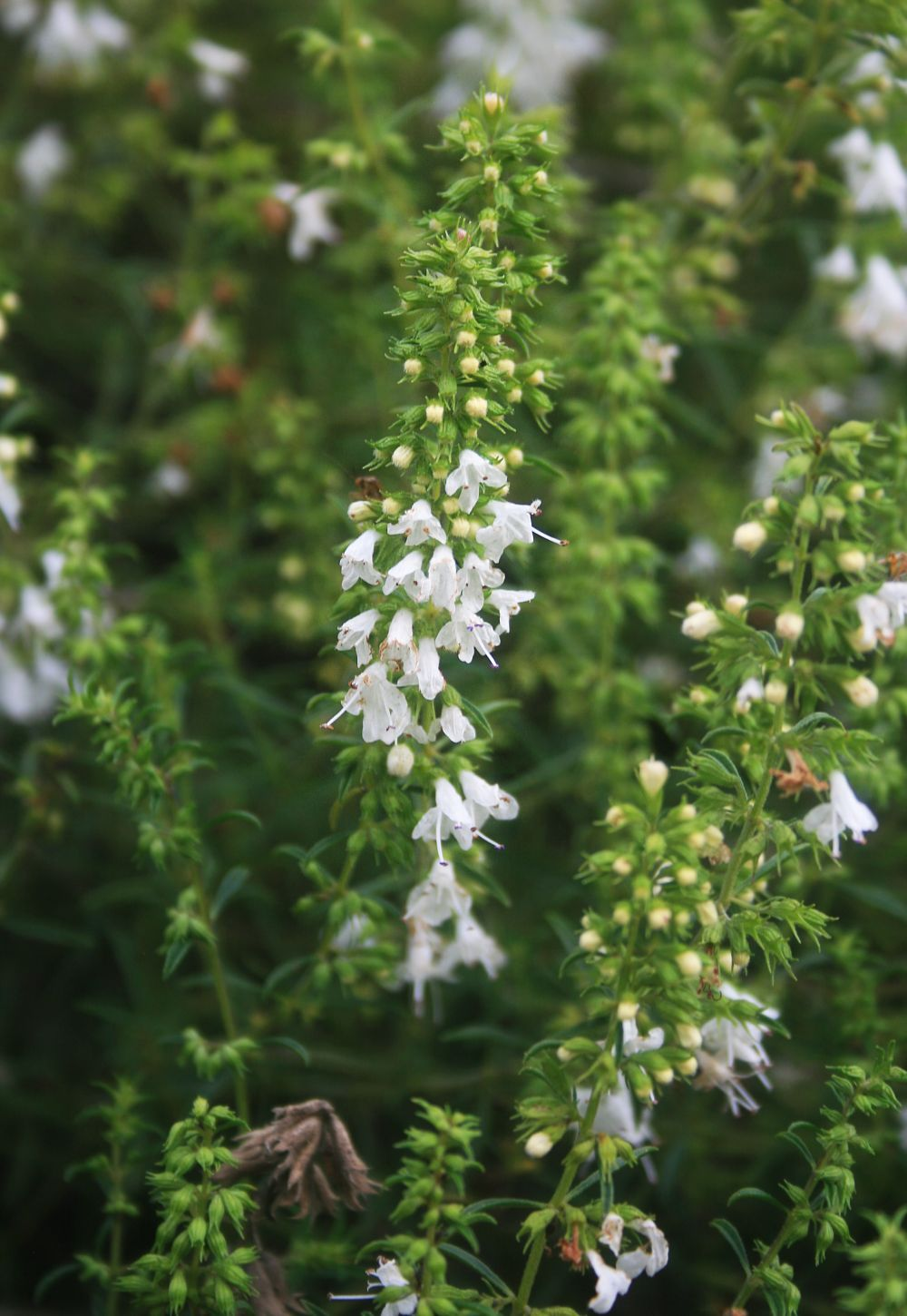 Satureja spicigera, Lippenblütler (Lamiaceae) – Georgien/საქართველო: Kleiner Kaukasus, NW Patara Mitarbi, ca. 6 km E Tsagveri/წაღვერი, ca. 1165 m s.m.